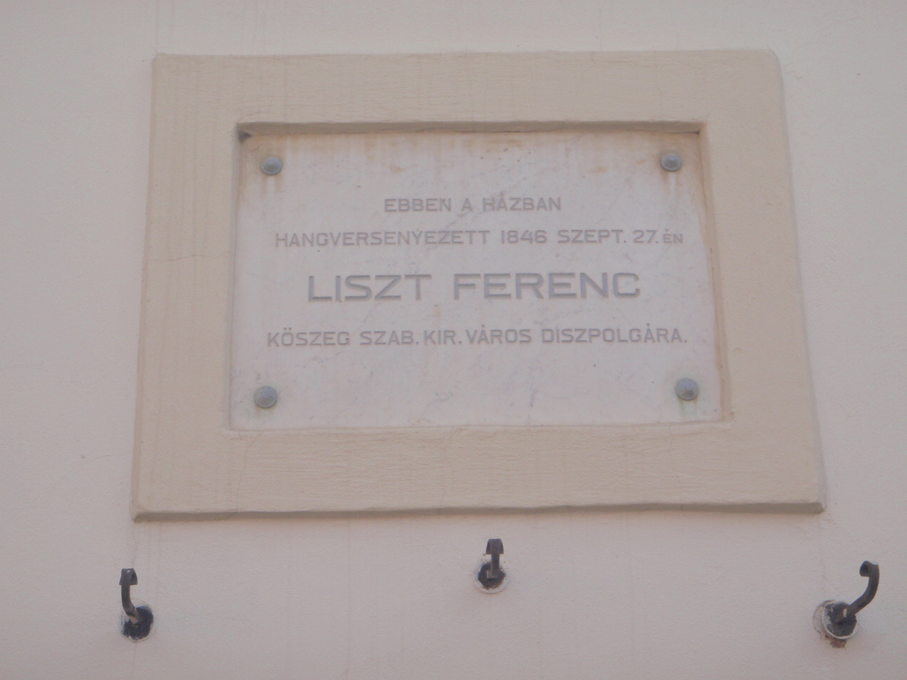 Franz Liszt Gendenktafel in Güns